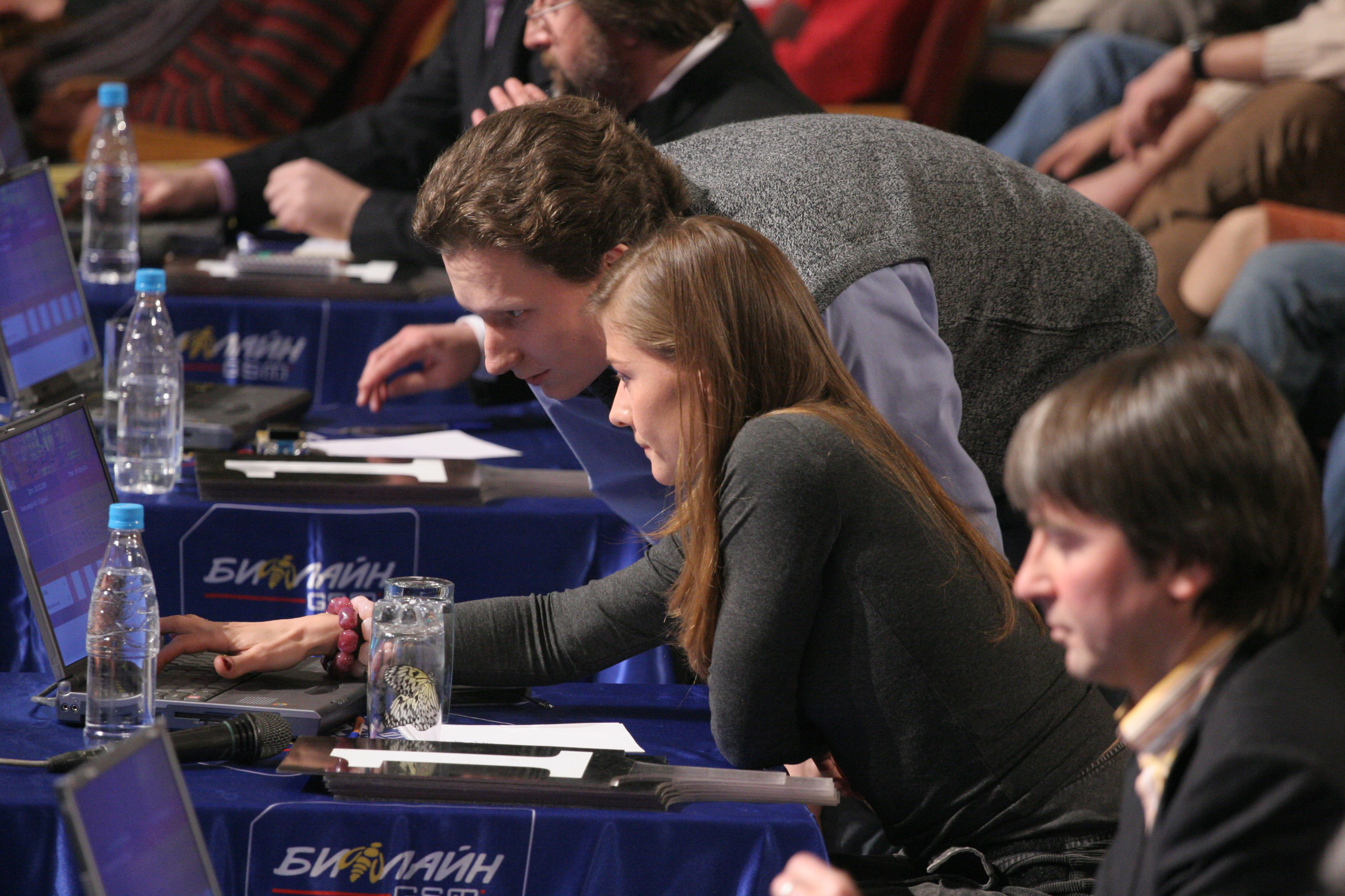 Александр Третьяков общается с членами жюри Высшей Лиги КВН.